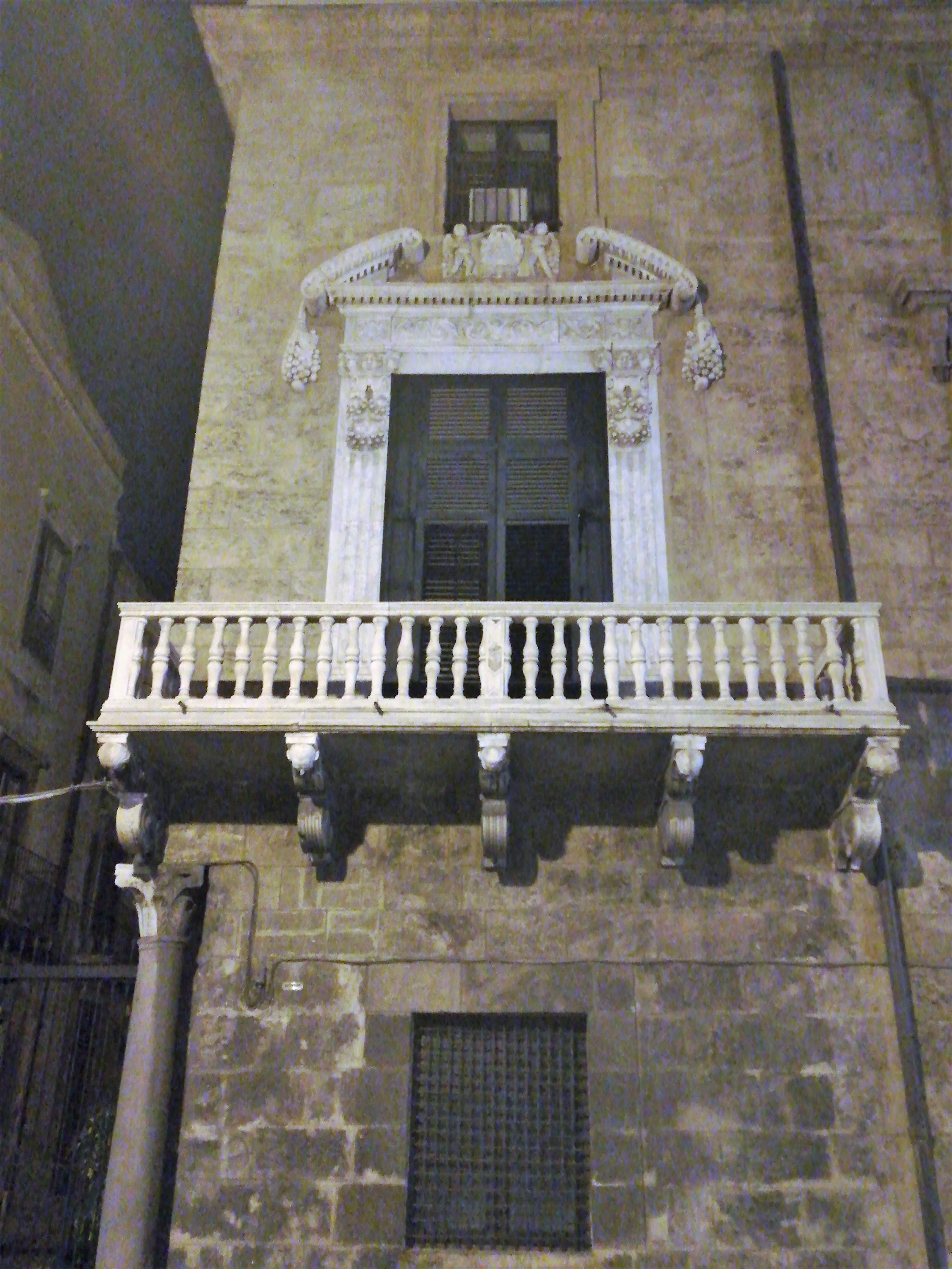 Balcone di Valerio Villareale. Angolo Seminario. Palazzo Arcivescovile Palermo